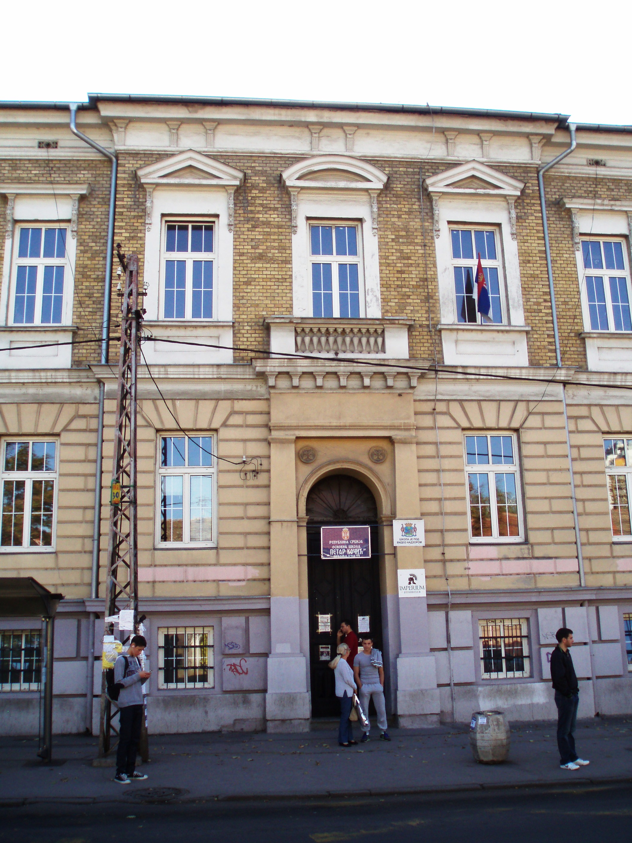 Zgrada OŠ Kraljica Marija u Zemunu Prvomajska 79, autor fotografije: Nicolo